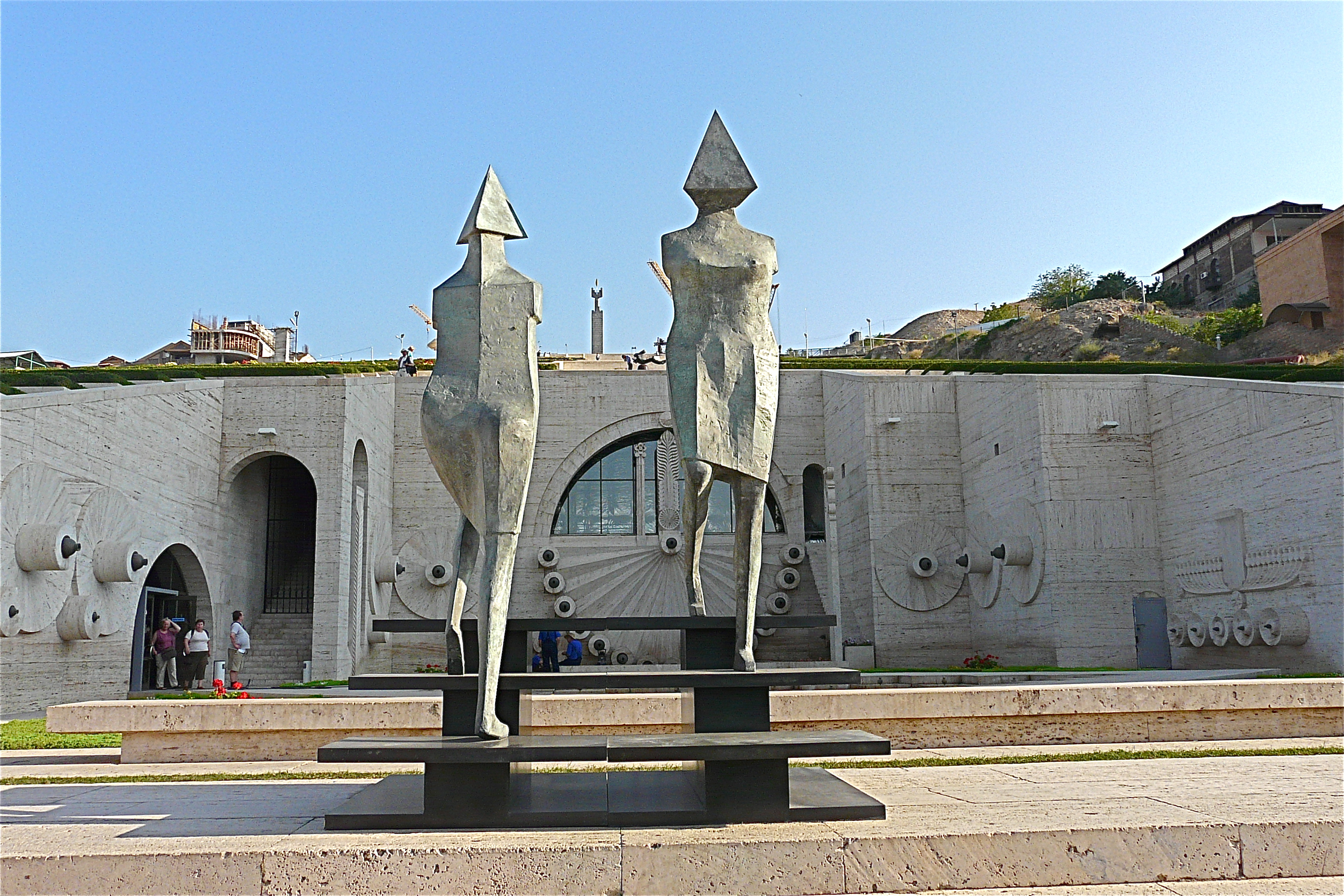 De waterfonteinen, een bouwwerk uit de jaren 1970. Van op de top een prachtig zicht op het centrum van Jerevan en in de verte op de steeds besneeuwde top van de Araratberg. Ook aan te bevelen om 's morgens even de trappen op en af te joggen! zie ook